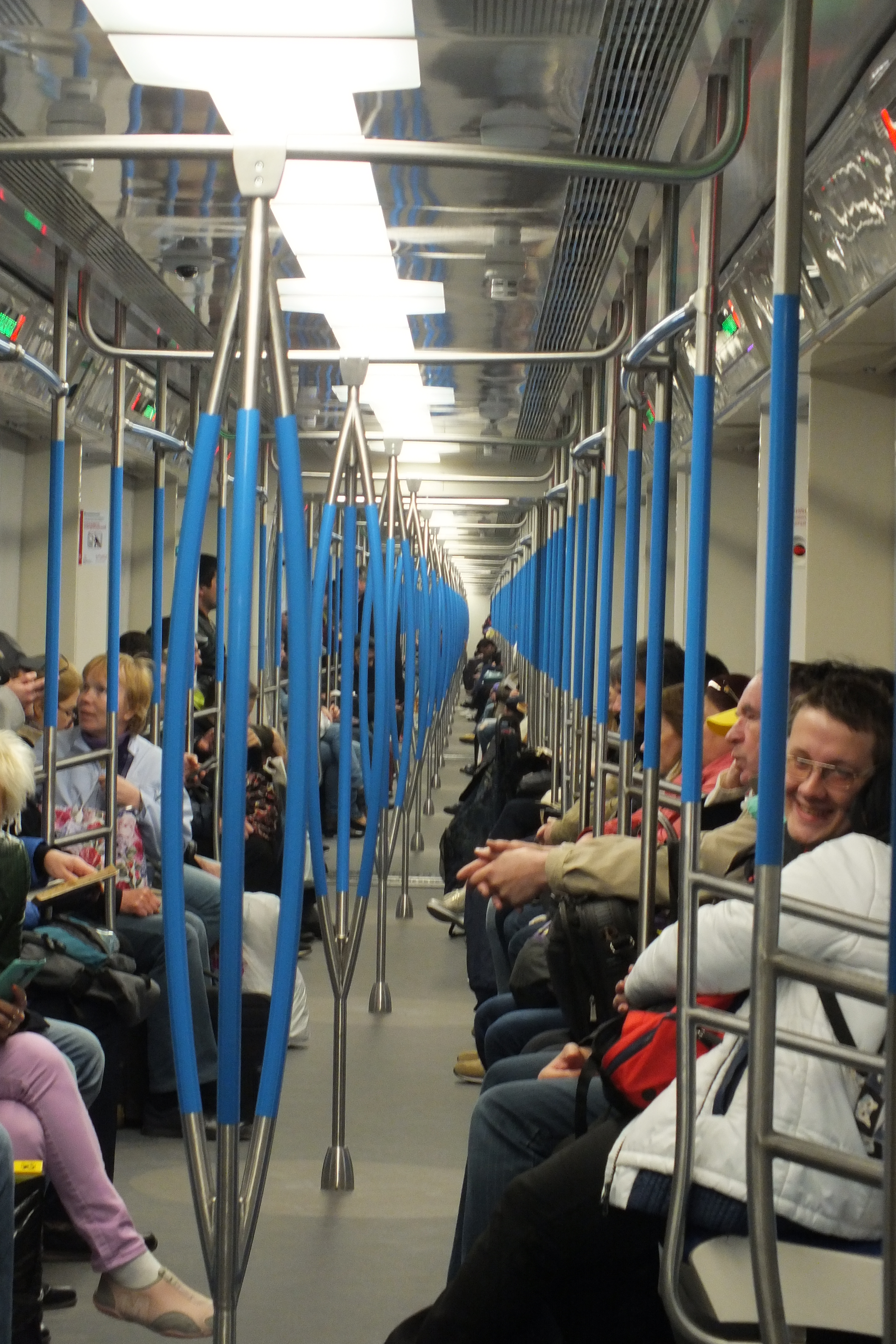 Перспектива из центральных поручней в поезде типа 81-765/766/767 «Москва».